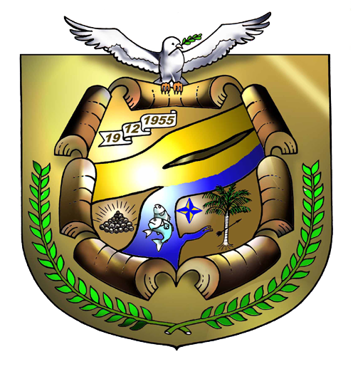 Brazao de Novo Aripuana